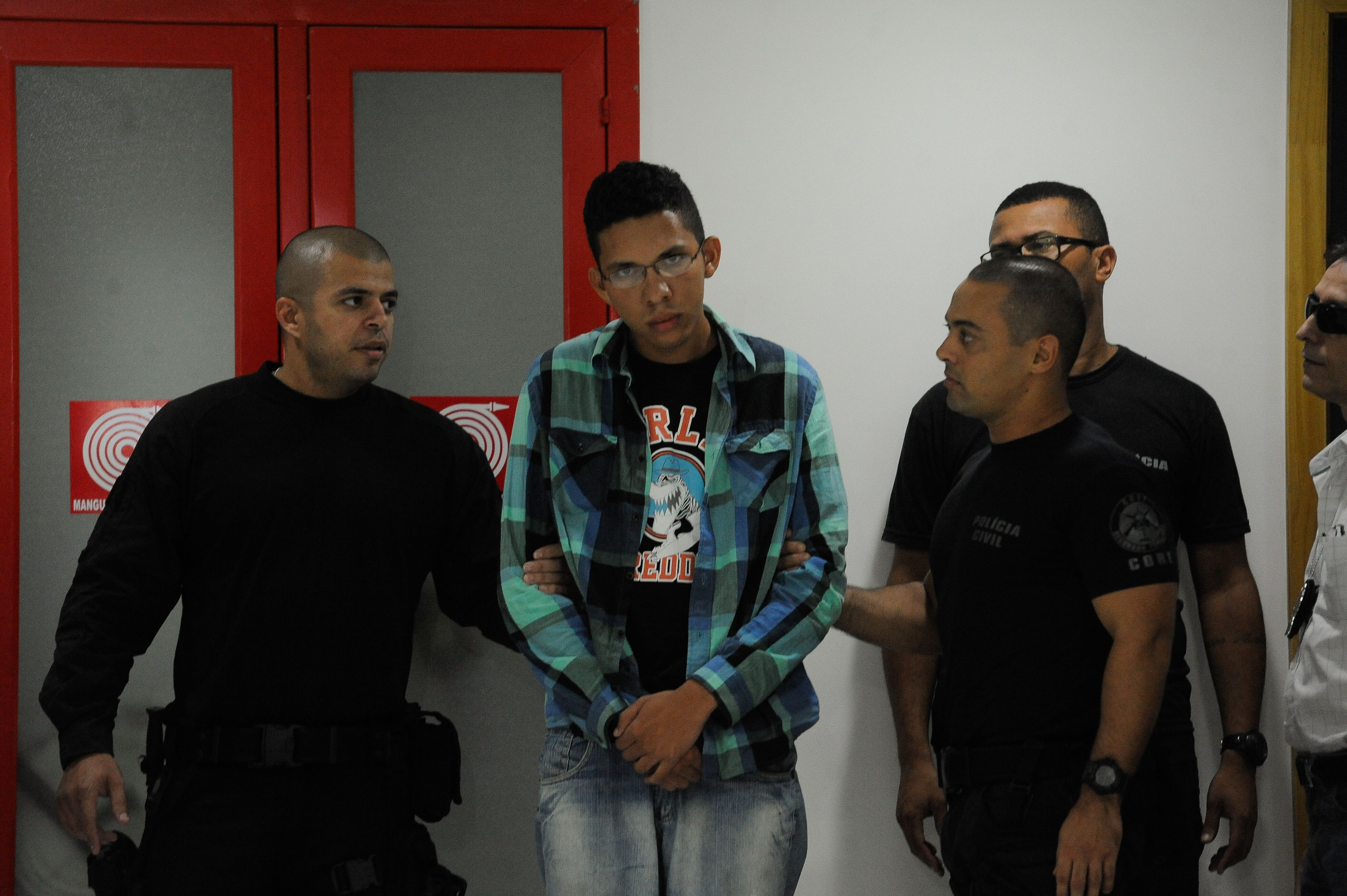 Suspeito de acender rojão é apresentado pela polícia